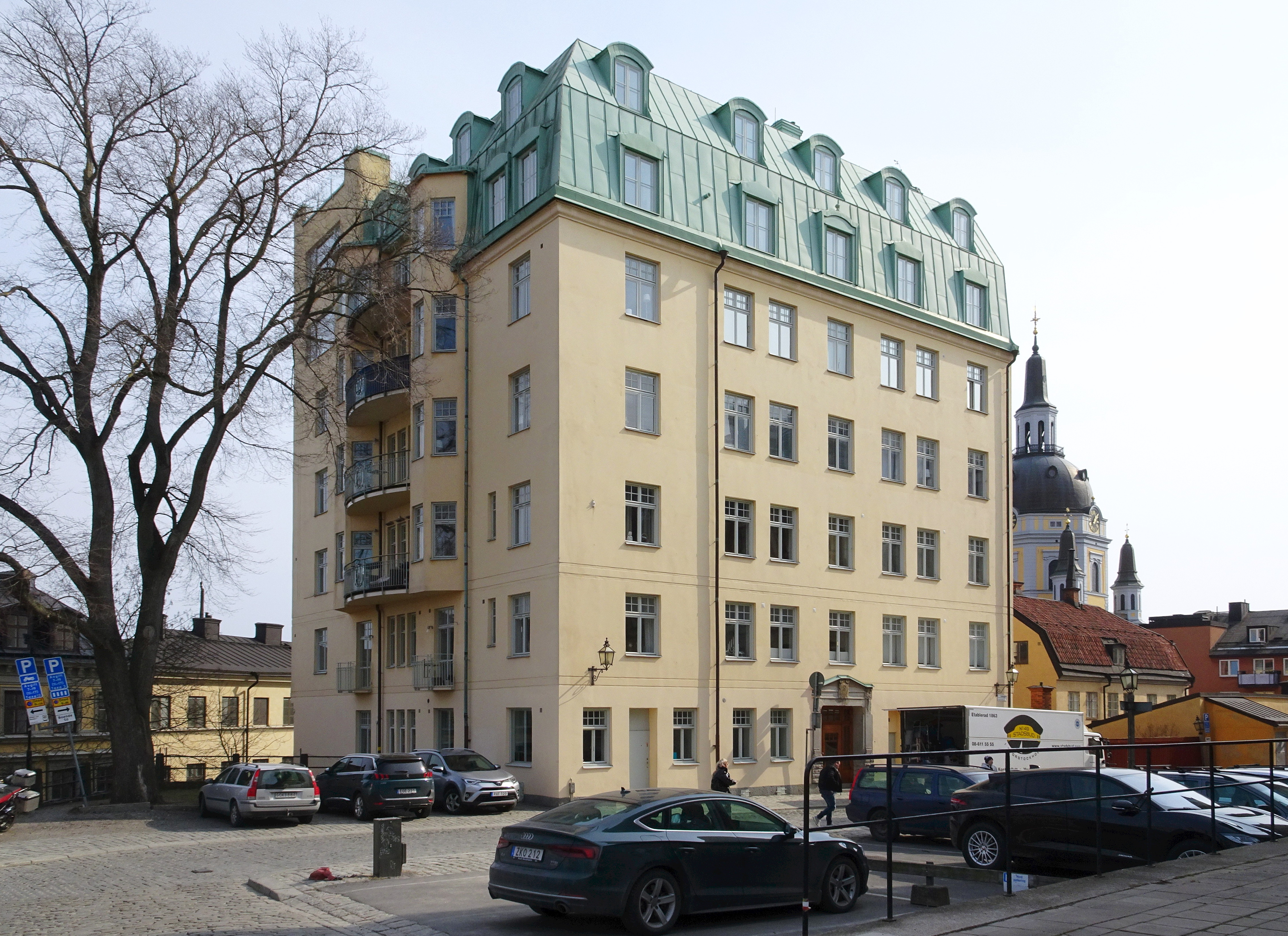 Höga Stigen Större 17, Fiskargatan 9, Svartensgatan 27-29, Uppförd 1907-1908. Arkitekt Knut Peterson, byggherre AB F Perno, byggmästare A Nordström.